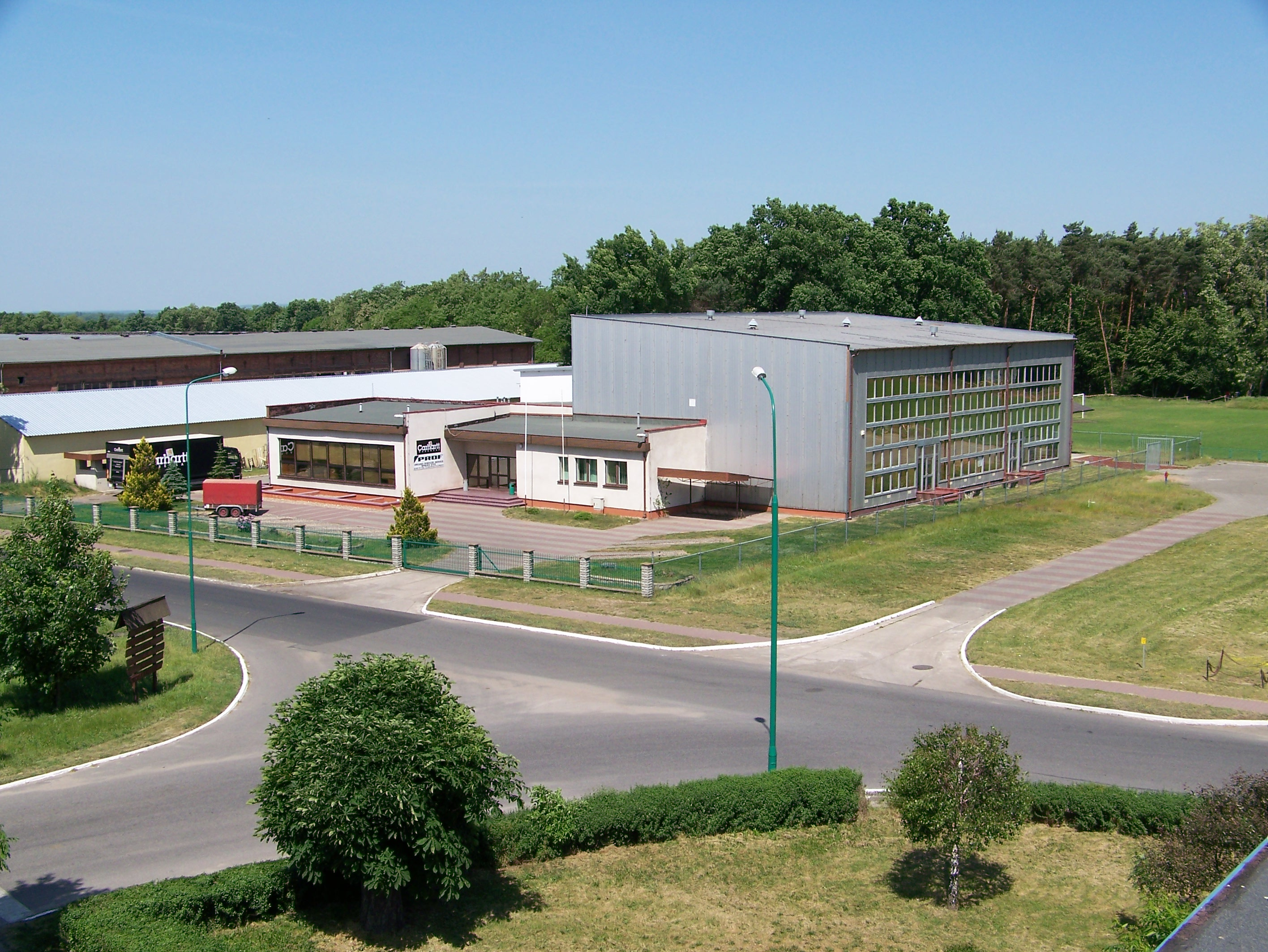 Szwalnia w Bieganowie